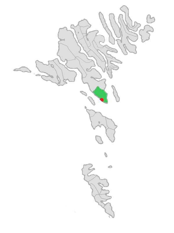 Kirkjubøar kommuna, Faroe Islands before January 1, 2005.